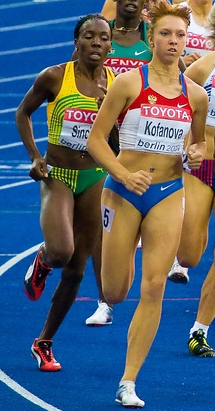 800m Semifinale der Frauen.